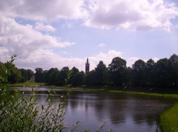 Blick über dem Wörlitzer See